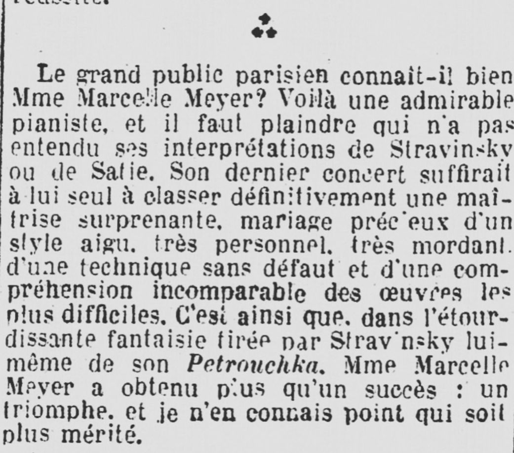 Article d'opinió en que George Auric destaca les qualitats interpretatives de Marcelle Meyer